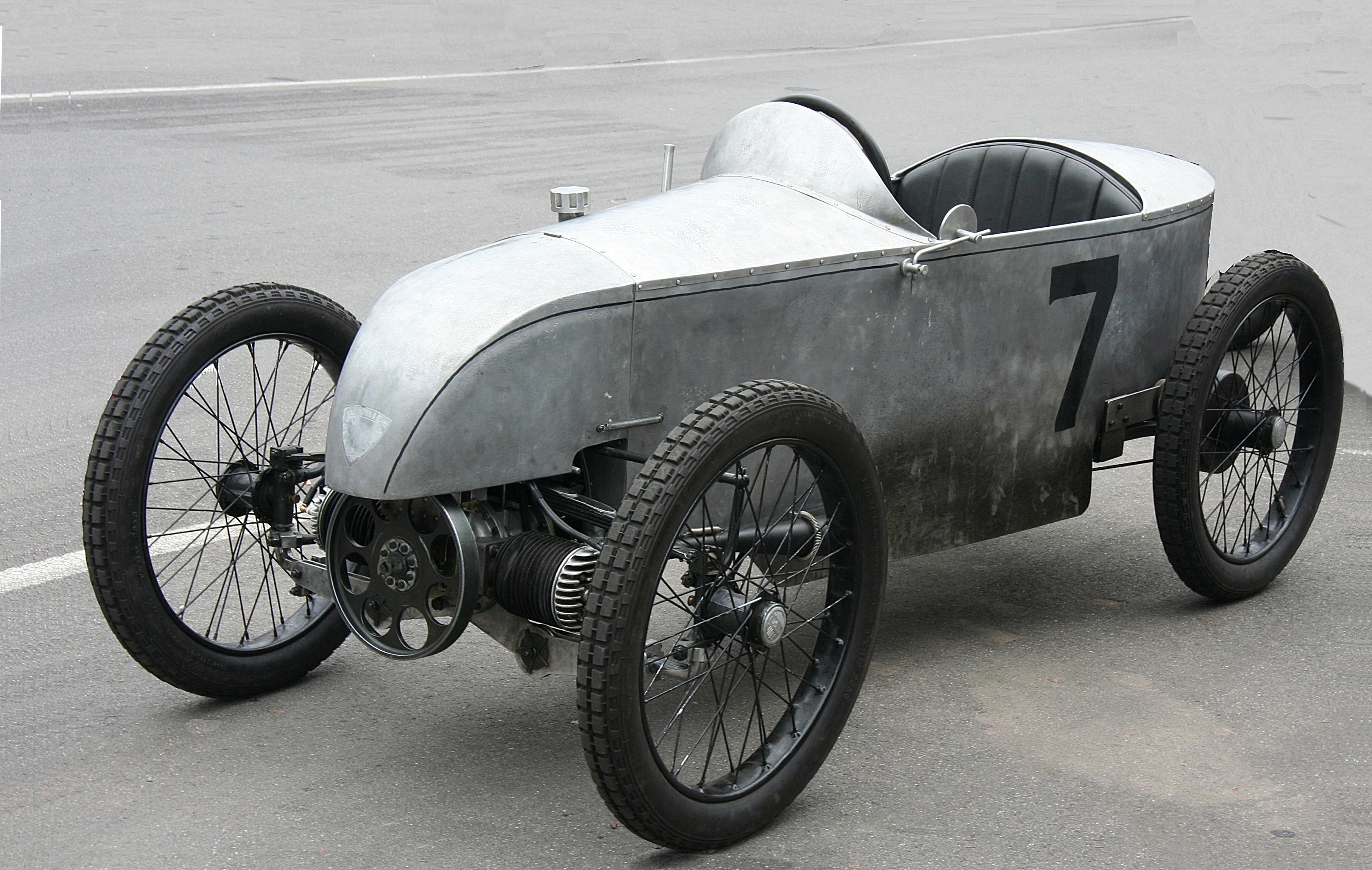 Sima-Violet, Baujahr um 1923/24, Zweizylinder-Zweitakt-Boxermotor, beim Oldtimerfestival 2008 im historischen Fahrerlager des Nürburgrings